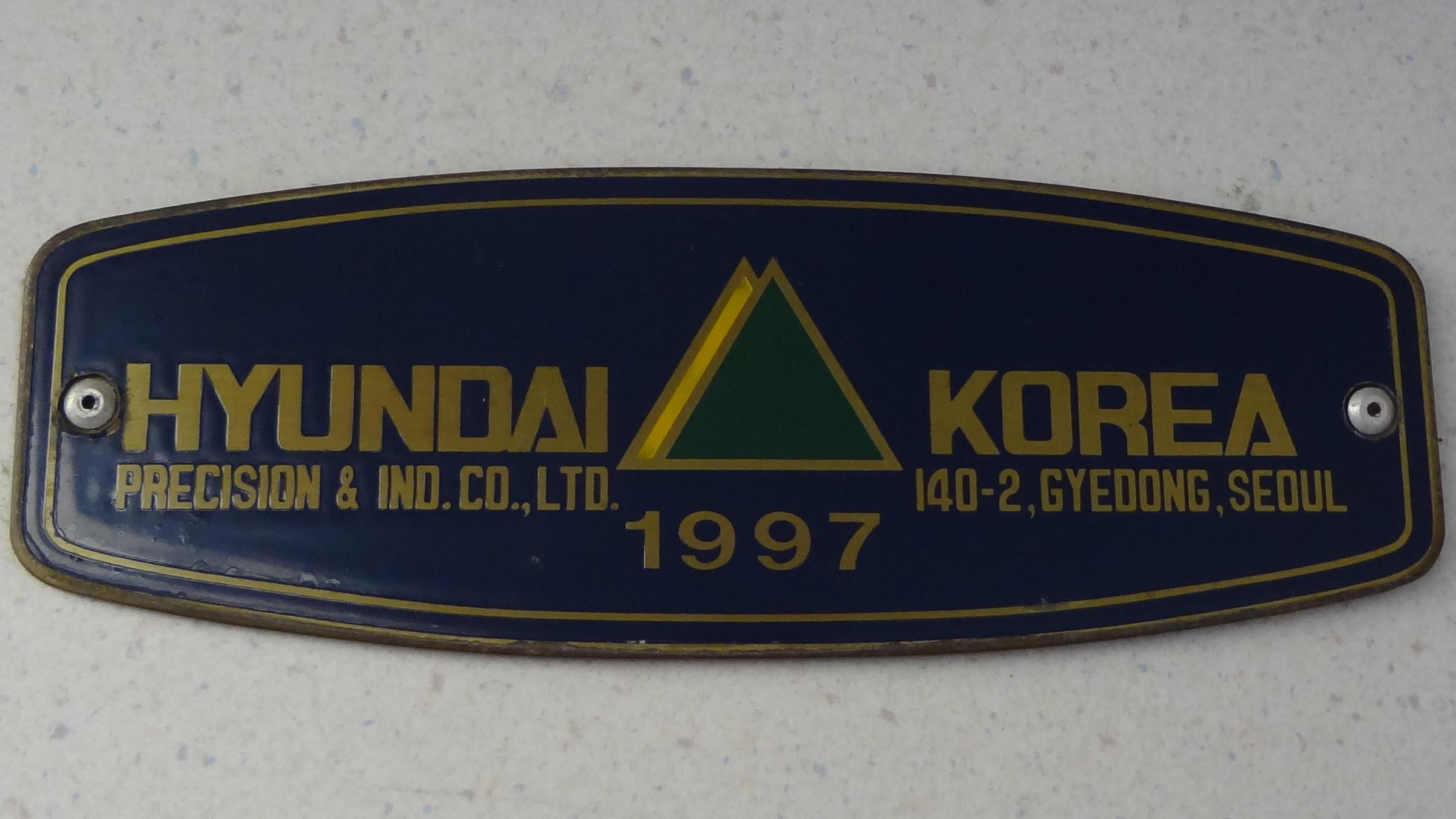 臺灣鐵路管理局推拉式自強號客車PPT1111內的現代精工銘板。